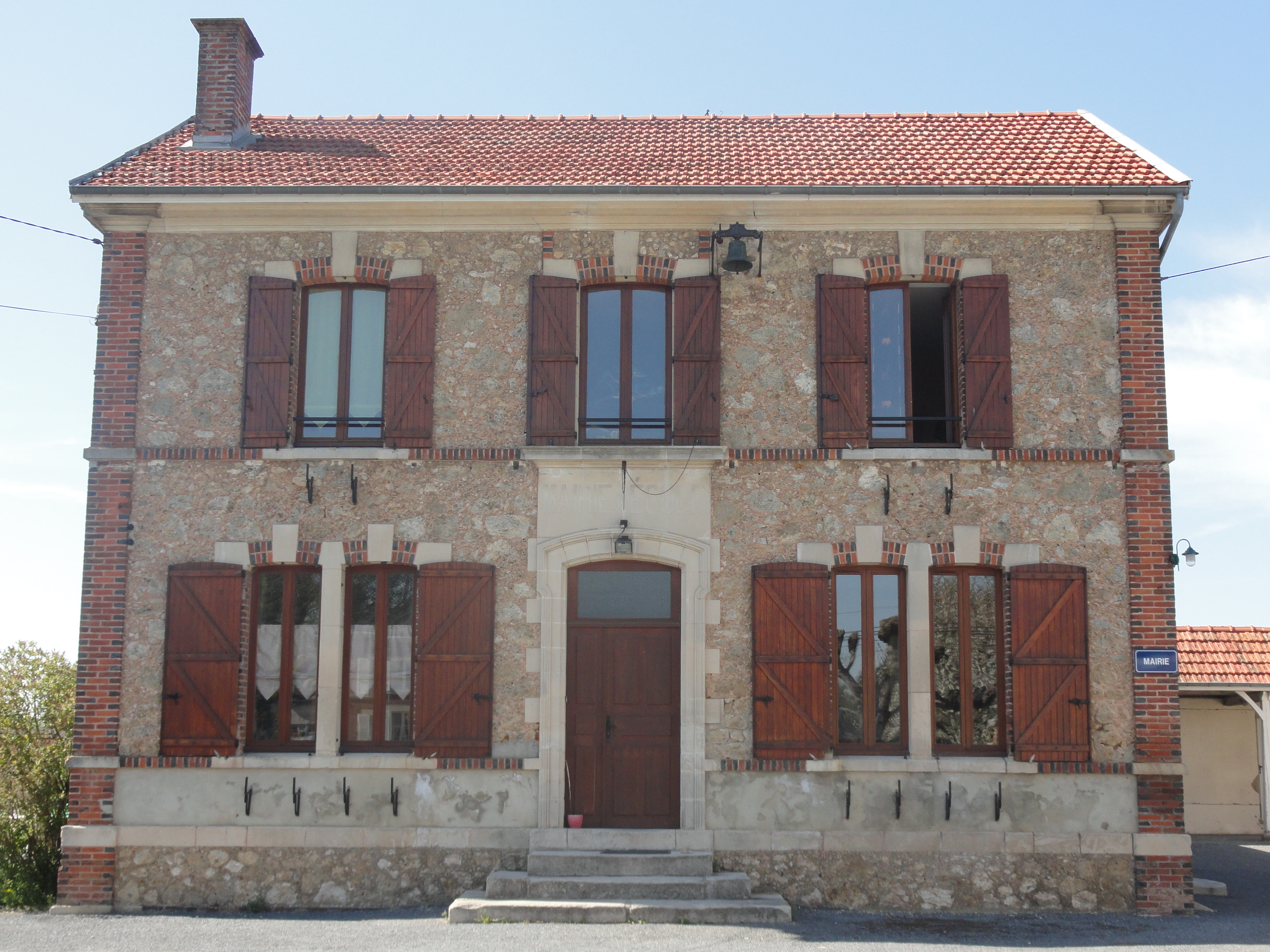 Mairie de Saint-Mard-lès-Rouffy (France).